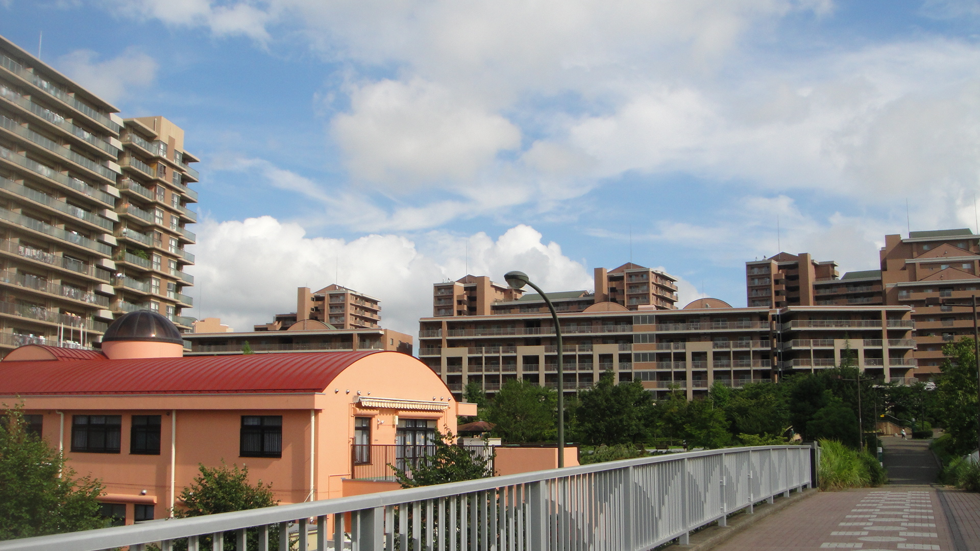 鑓水の開発地域の風景